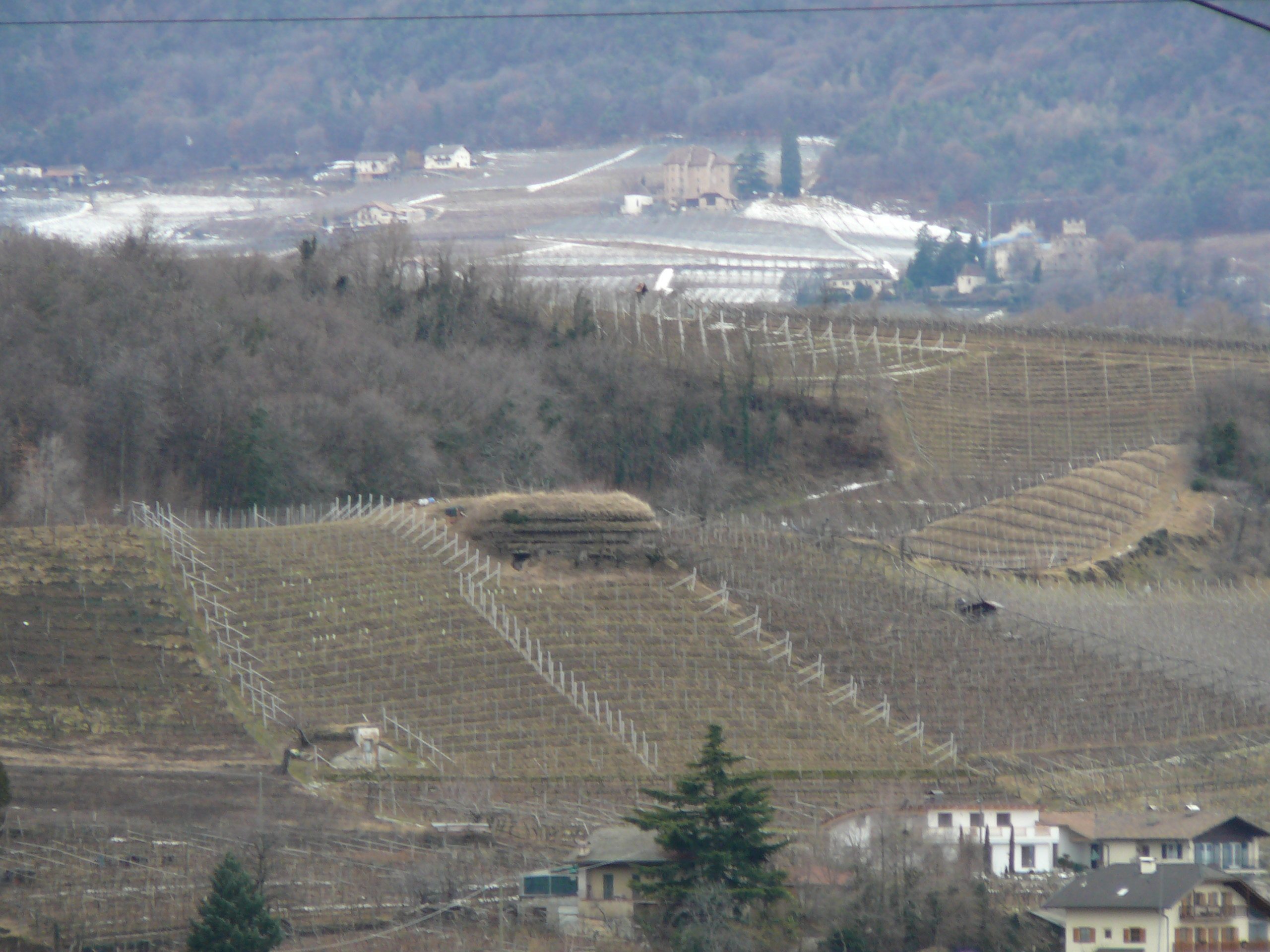 Opera 27 Bolzano